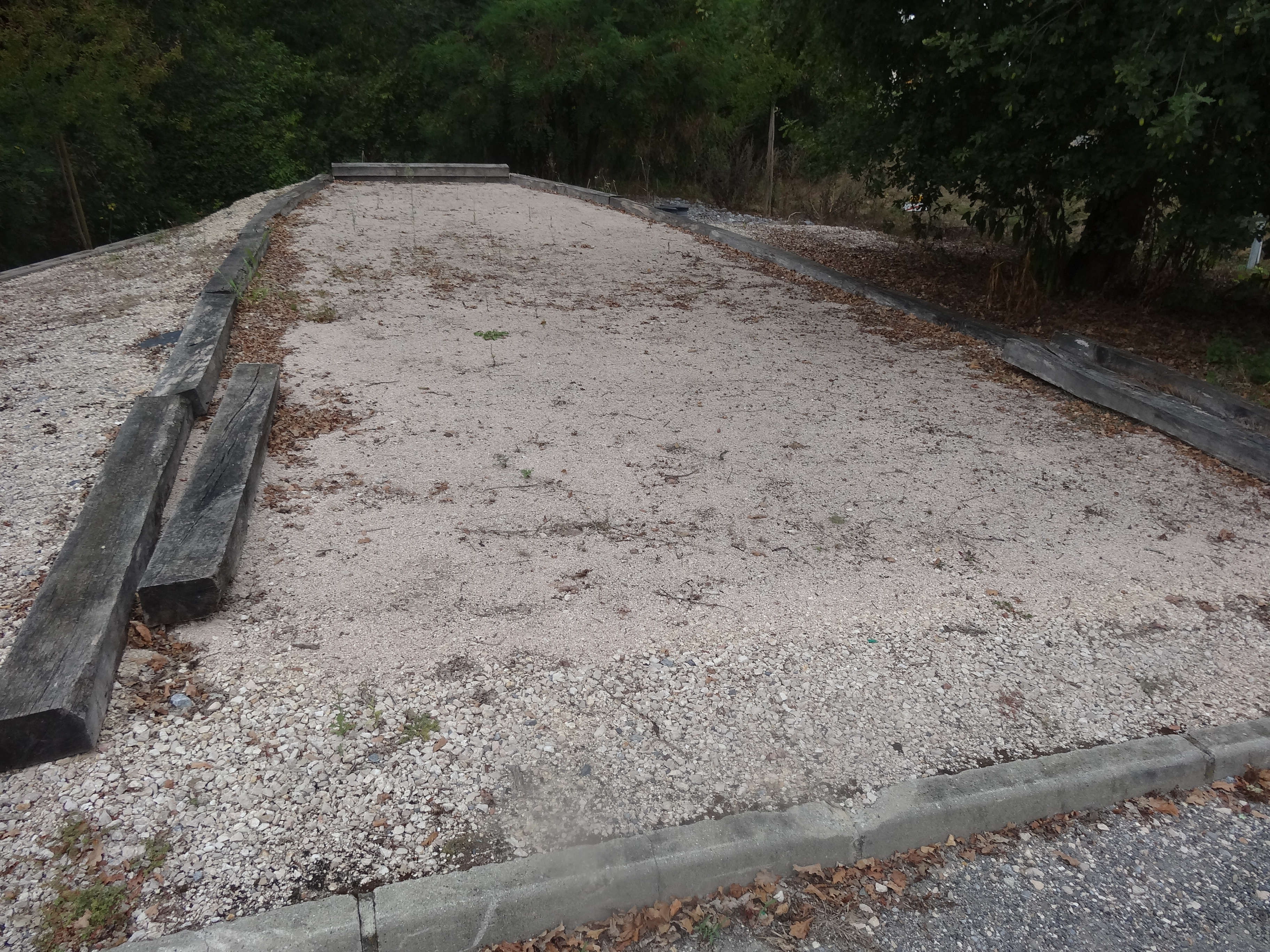 Petit boulodrome de Cuélas.